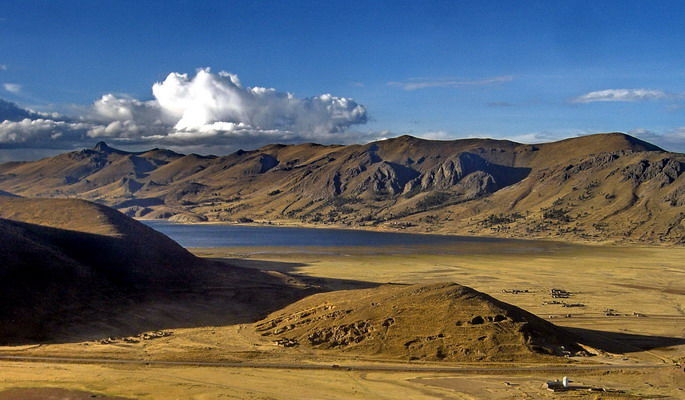 Vista aerea de la Laguna de Chacas al fondo el Iquinito el cerro mas alto de la cadena.